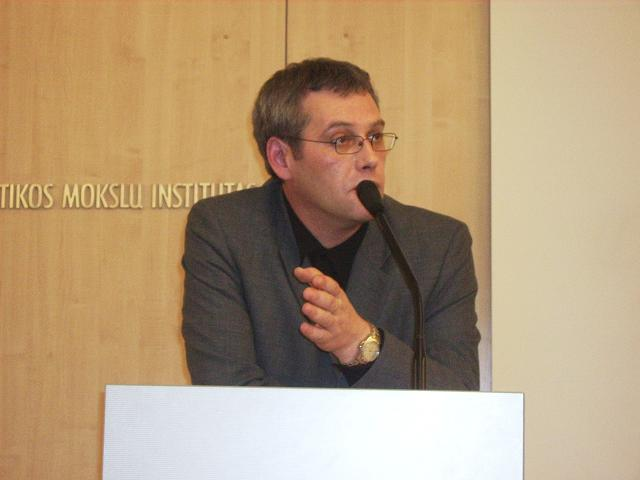 Raimondas Lopata